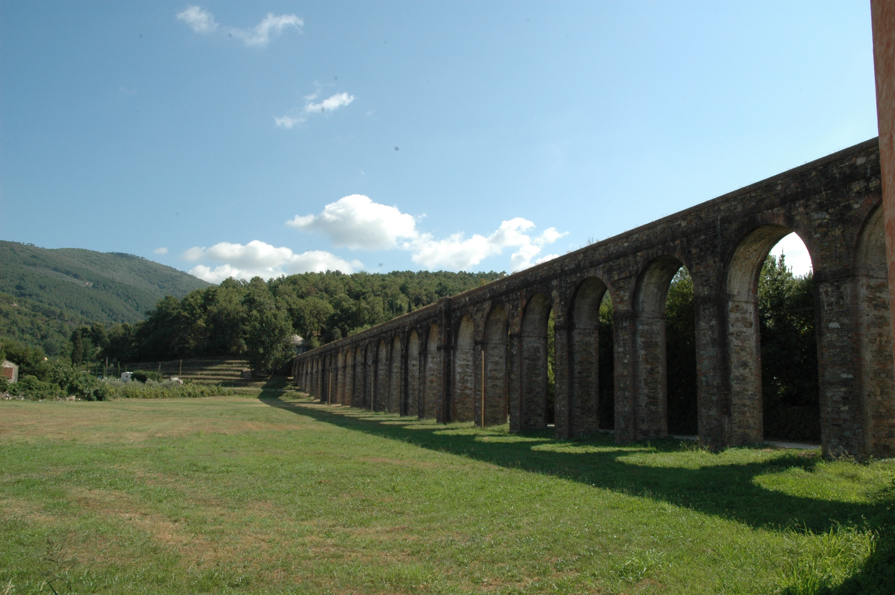 Acquedotto del Nottolini e tempietto di Guamo (Capannori)